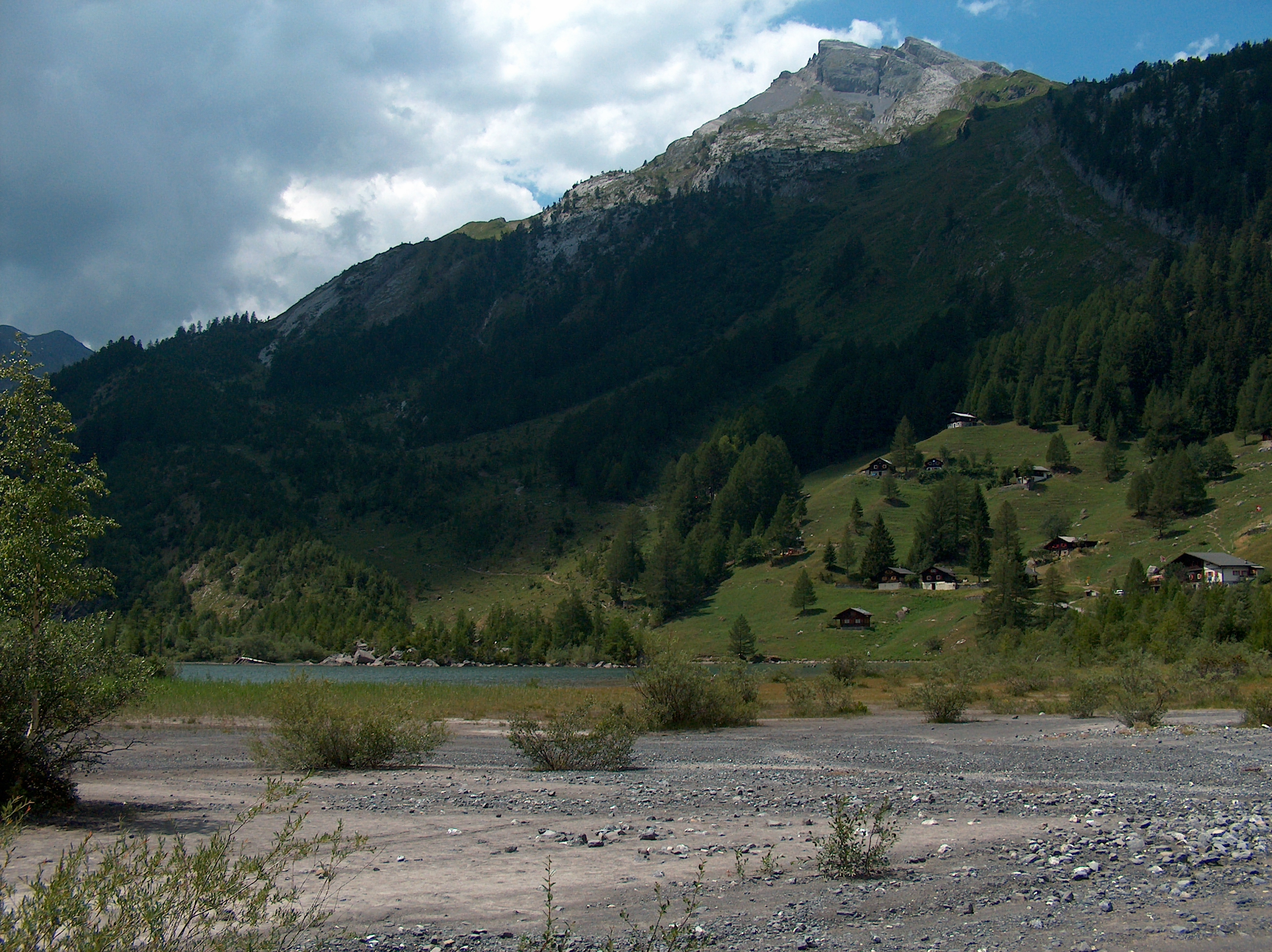 View at Lac de Deborence